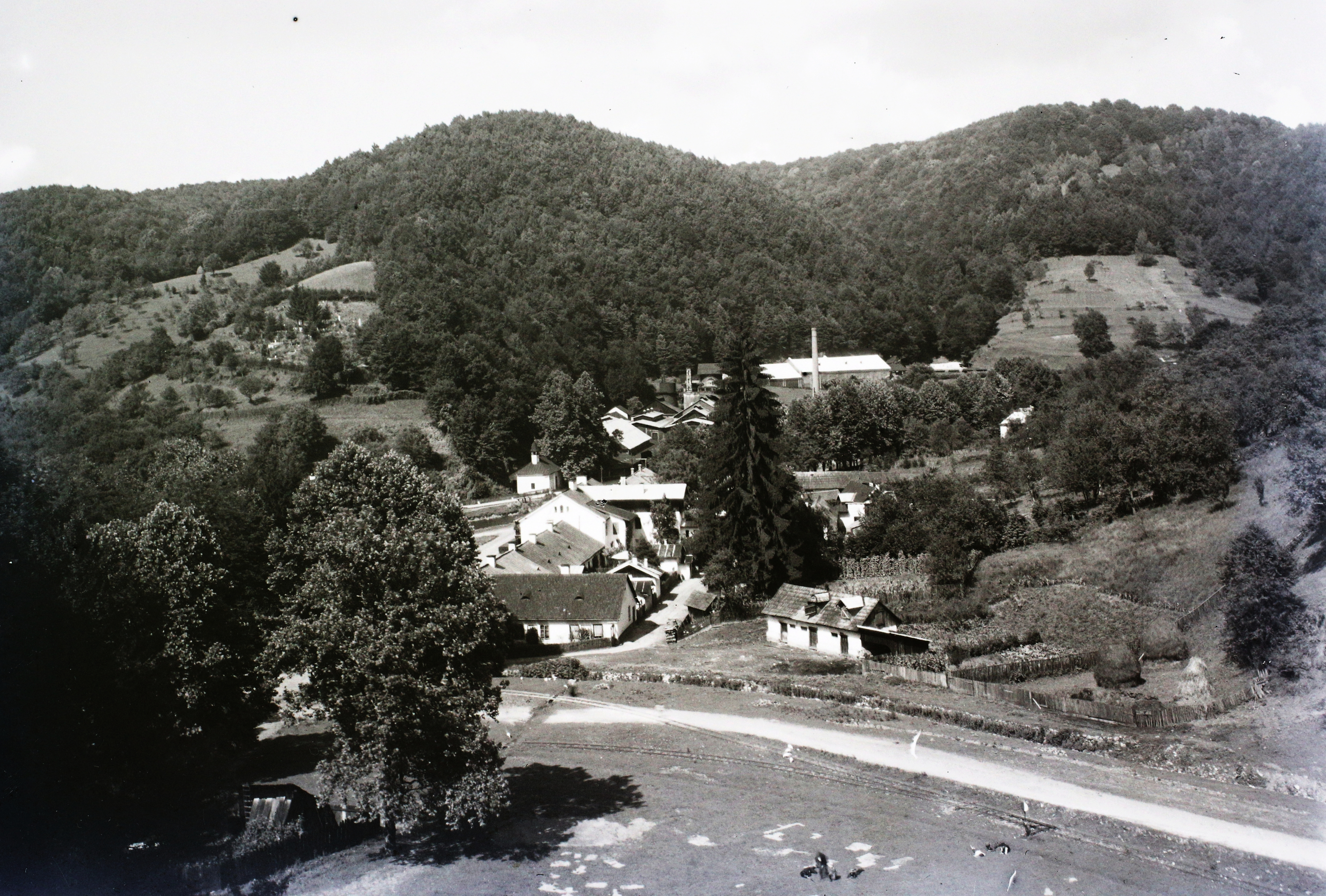 a község látképe, előtérben lent a Gavosdia - Nadrág közötti iparvasút vágánya. Location: Romania, Transylvania Title: a község látképe, előtérben lent a Gavosdia - Nadrág közötti iparvasút vágánya.